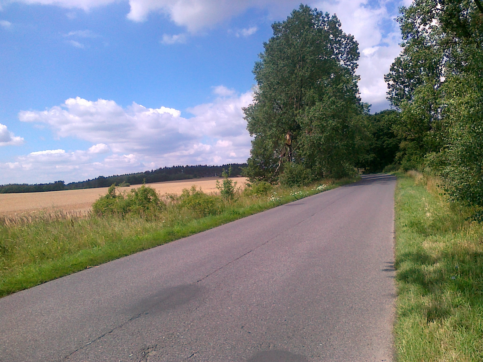 Droga wojewódzka numer 378 w okolicy wsi Zielonkowice.